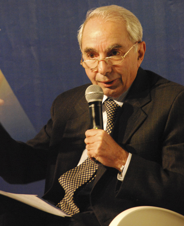 Giuliano Amato, Italian politician. Festival della Creatività 2009, Florence, Italy.